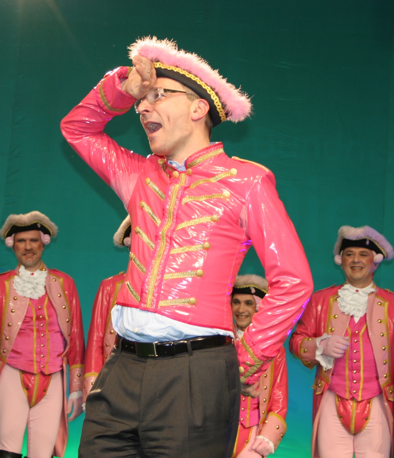 Volker Beck zusammen mit der schwulen Karnevalstruppe Rosa Funken Anfang Dezember 2006 auf dem Bundesparteitag der Grünen in Köln